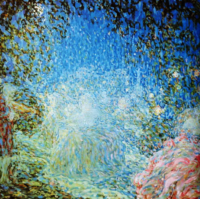 Хоровод